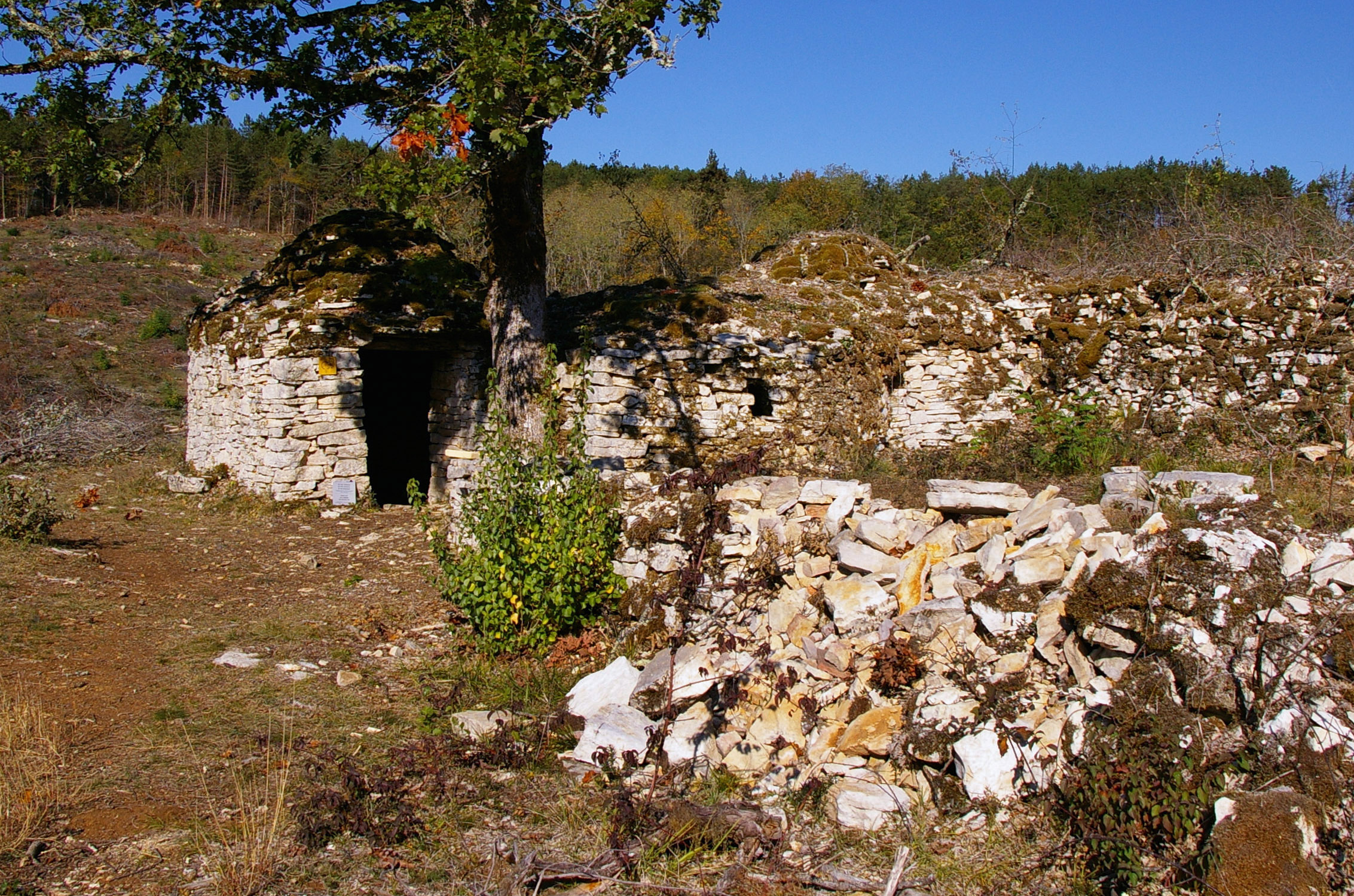 Cabane en pierre sèche de la Combe du Rat (Inscription), Daglan